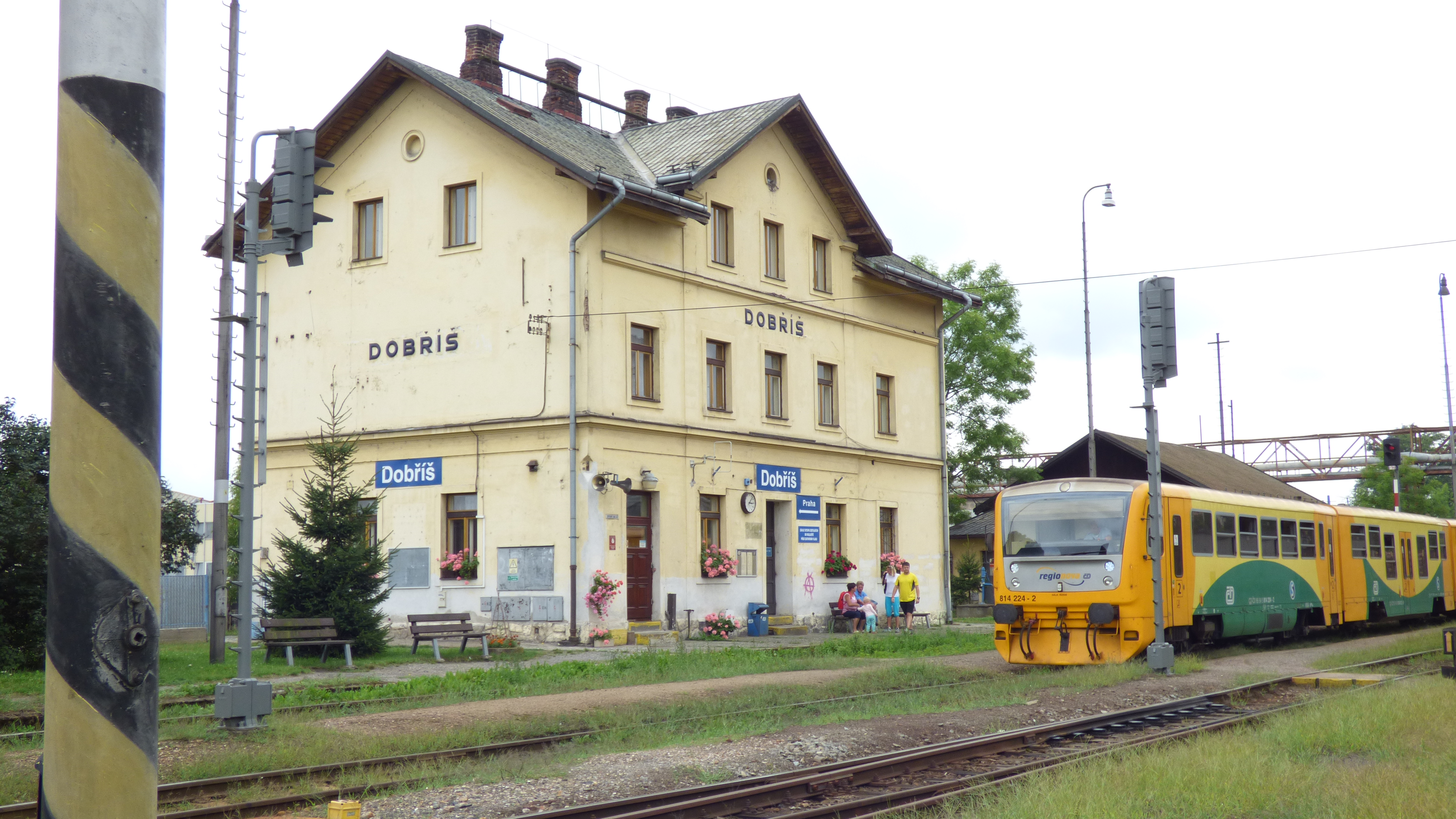 Dobříš